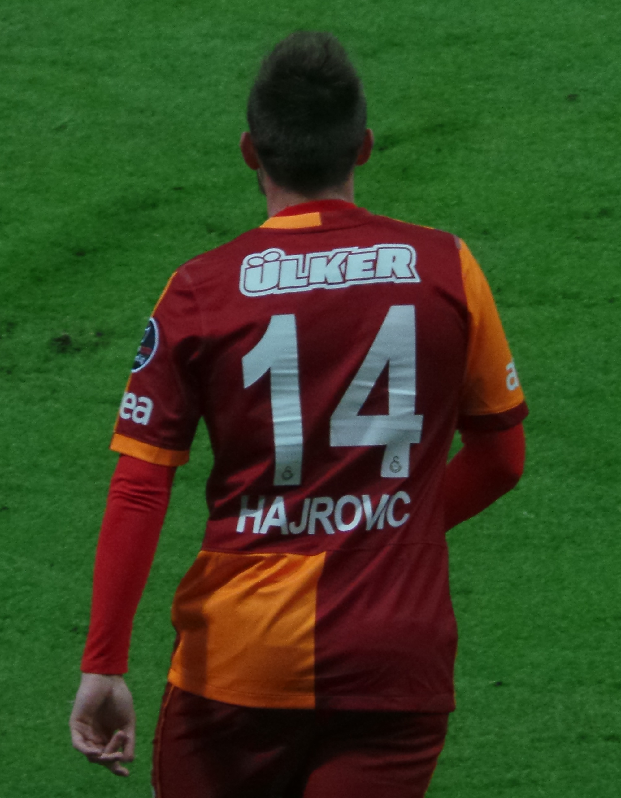 İzet Hajrovic with his nr. 14